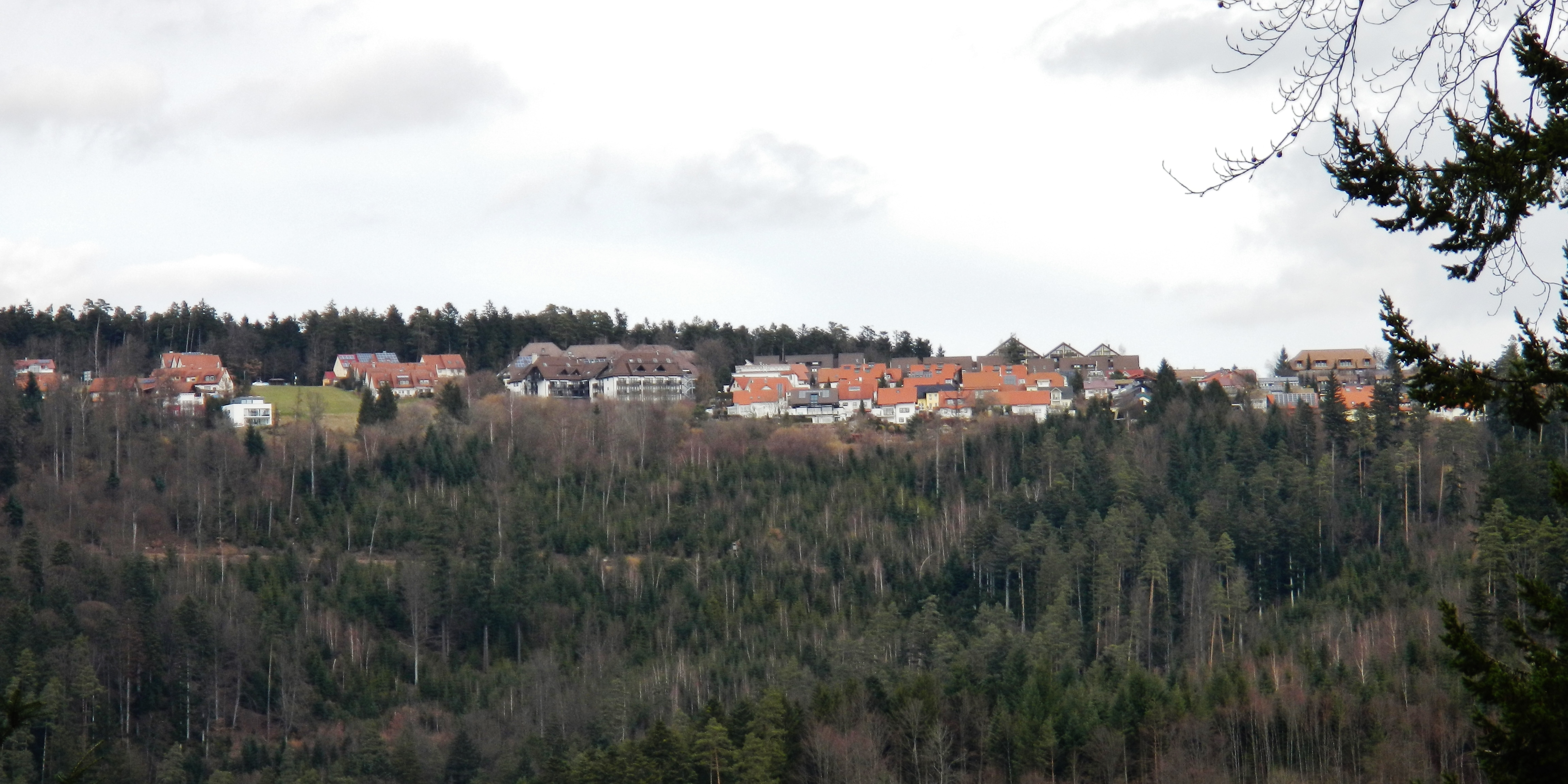 Monakam